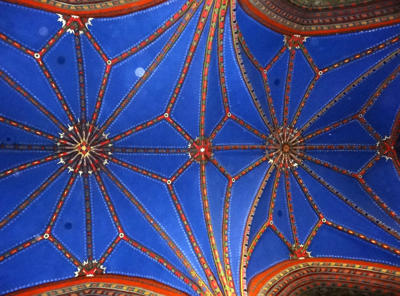 Sklepienia katedry w Bydgoszczy. Modernistyczna polichromia wykonana w latach 1922-1925 przez Henryka Jackowskiego wg projektu Stefana Cybichowskiego.